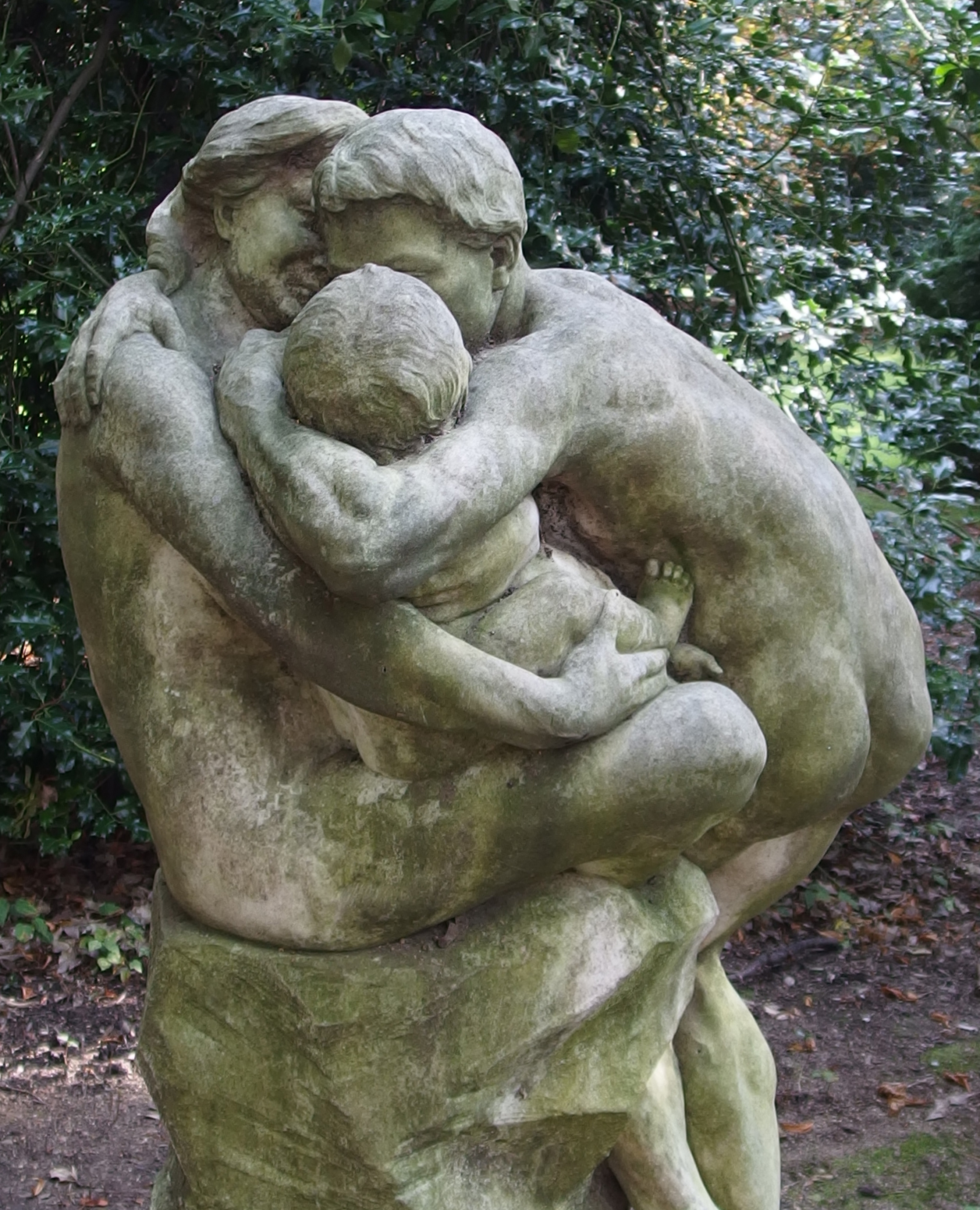 Die Stein-Skulptur Familie mit Kind wurde von dem belgischen Bildhauer Henri Boncquet (1868-1908) geschaffen und 1903 im Malkastenpark aufgestellt.